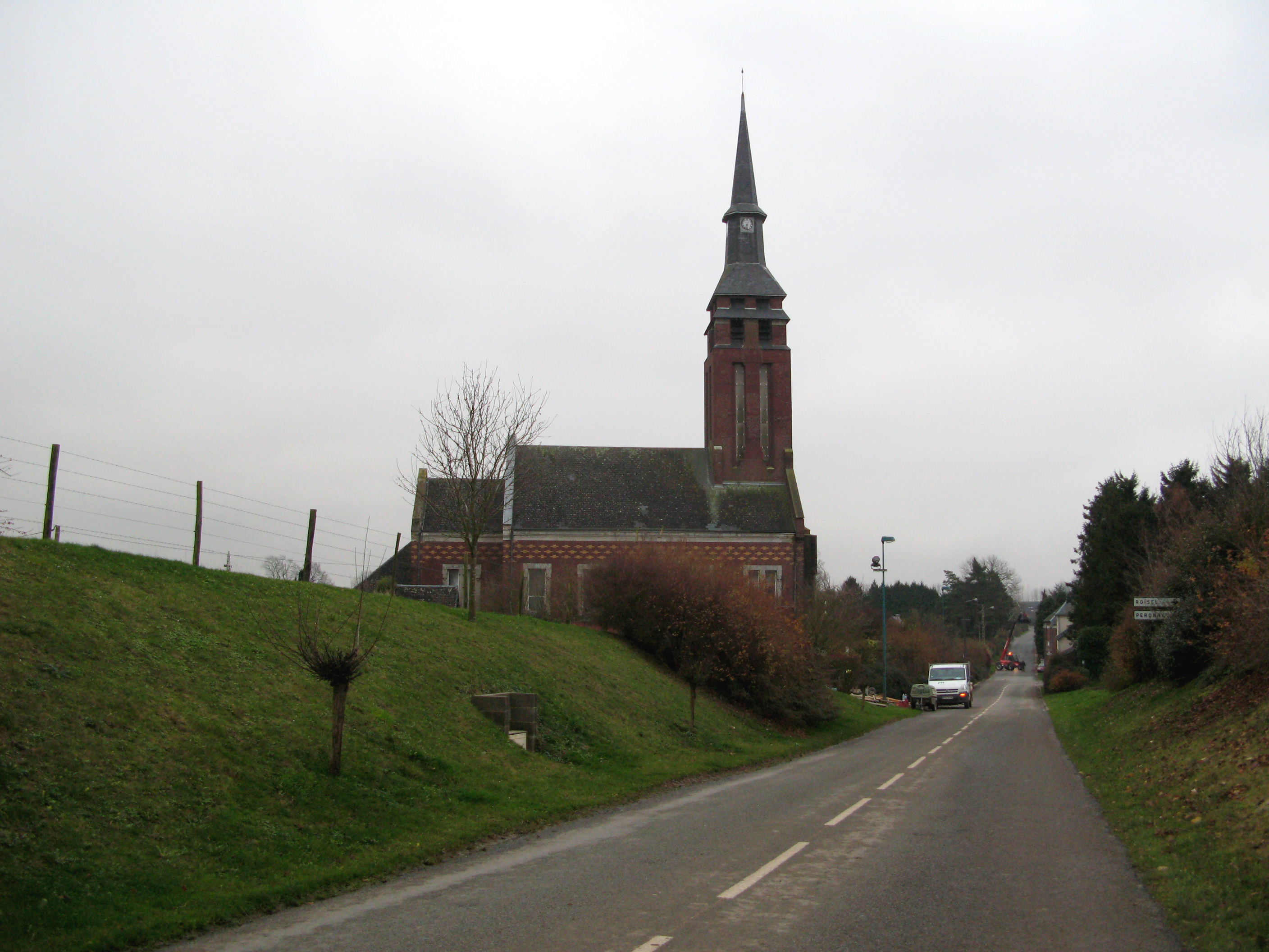 Guyencourt-Saulcourt (Somme, France) - L'église à la silhouette élancée marque l'entrée du village. .